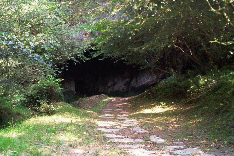 Imagen de la entrada de la Cueva del Valle, Rasines, Cantabria (España)